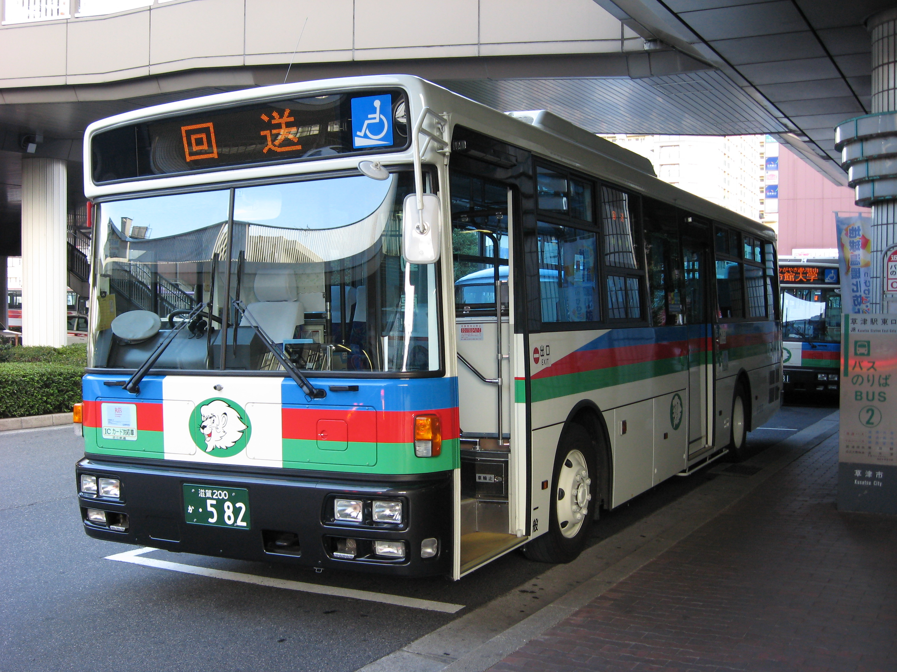 OHMI Railway Bus 0582 (Shiga 200 ka 0582)